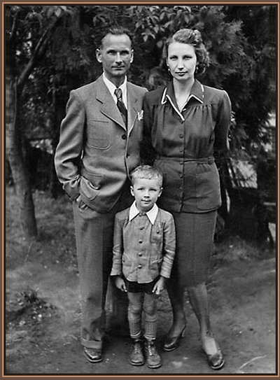 Idősebb Benedek Jenő (Kecskemét, 1906. január 16. – Budapest, 1987. július 19.) magyar festő családjával: feleségével, Andorkó Laurával és fiukkal, ifjabb Jenővel 1943-1944 körül.